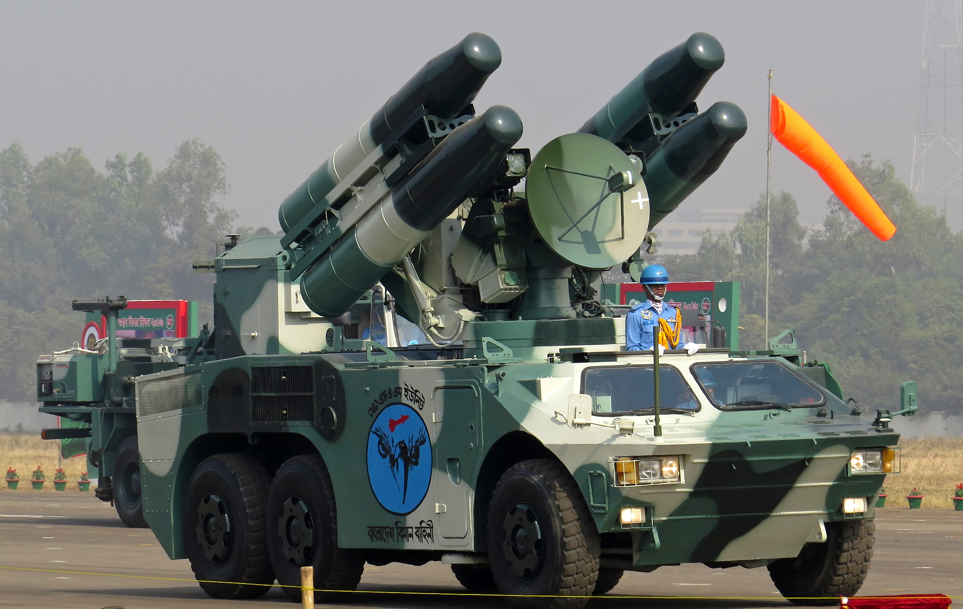 VGTJ/VDP 2016.